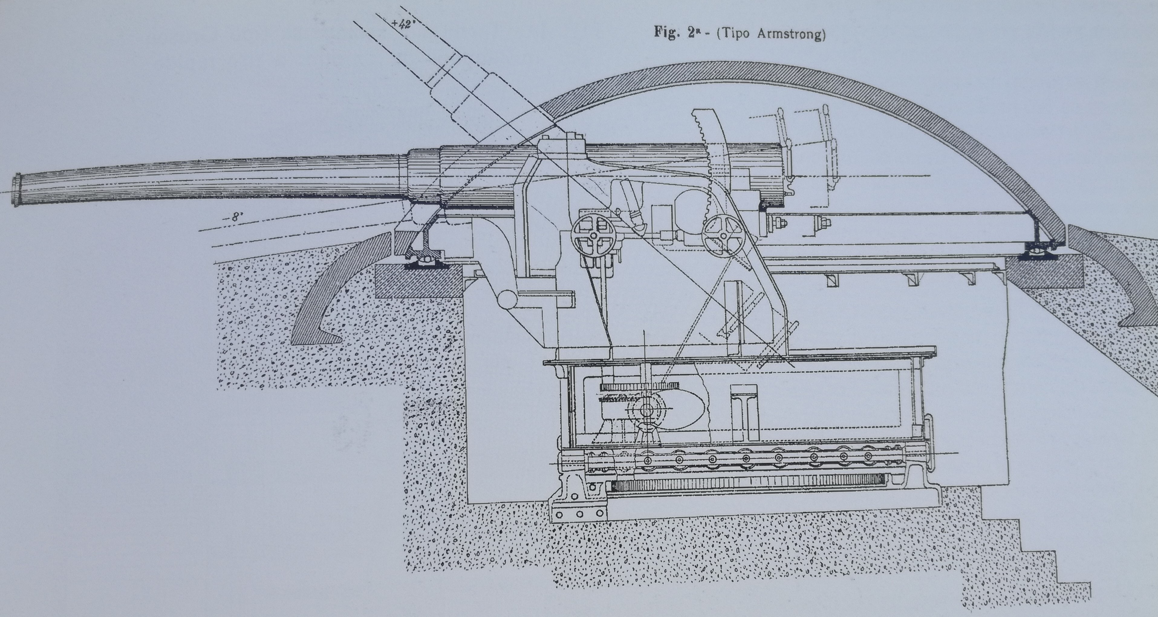 italienischer 149 mm Kanonenpanzerturm Typ Armstrong aus A. Guidetti - Fortificazione permanente